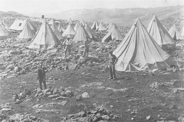 גדוד העבודה ע"ש טרומפלדור בשכונת רחביה בירושלים